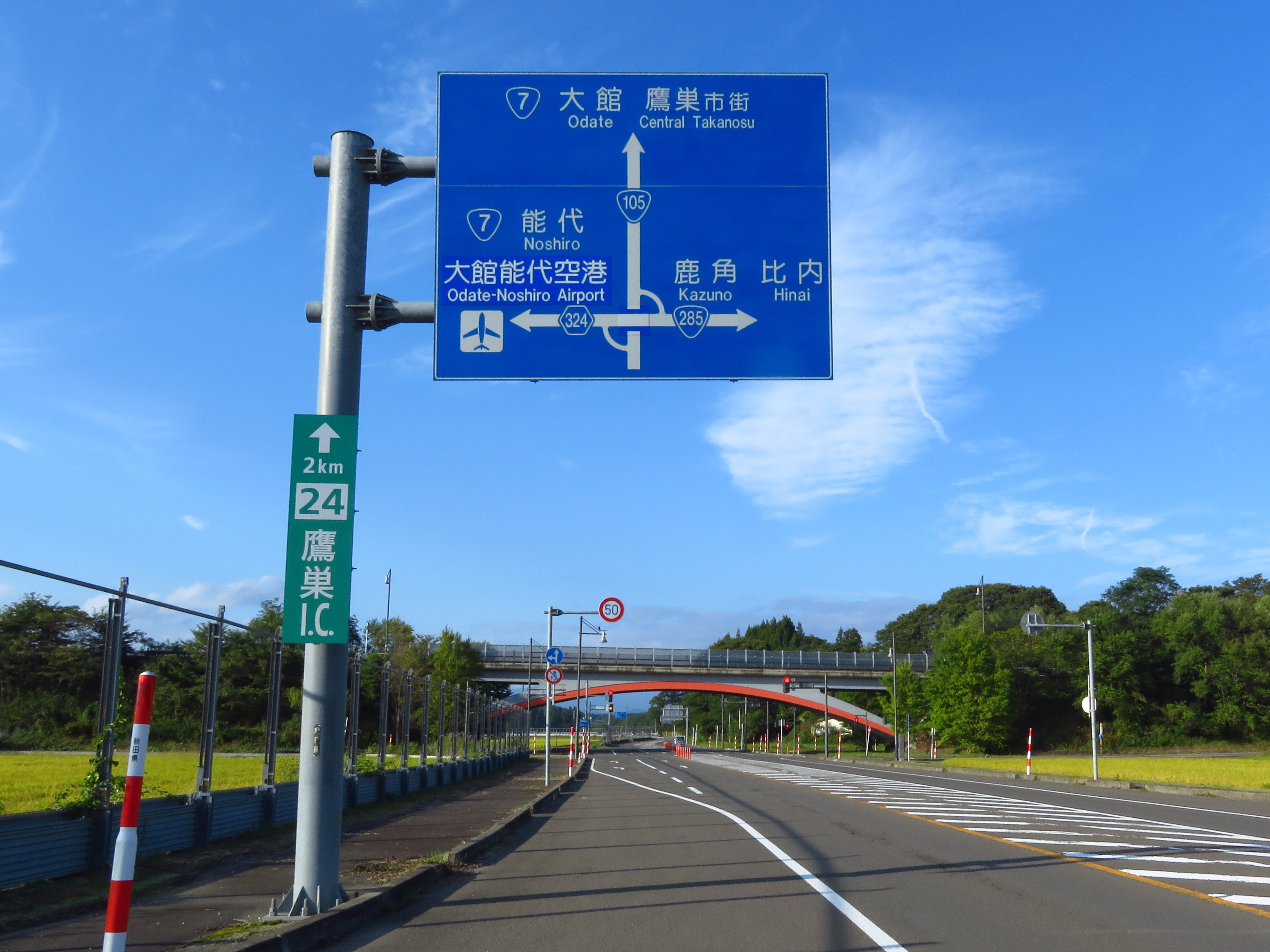 小森交差点付近：秋田県北秋田市 Canon PowerShot SX720 HS